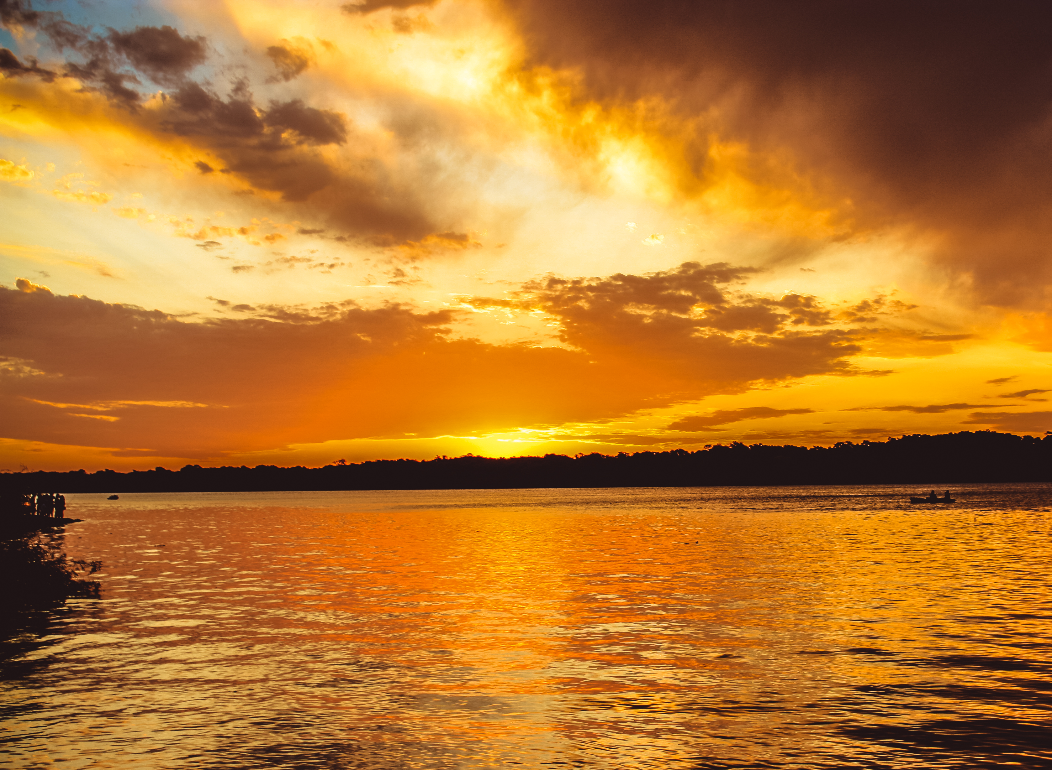 Fronteira Brasil-Argentina, no porto de São Borja-RS.